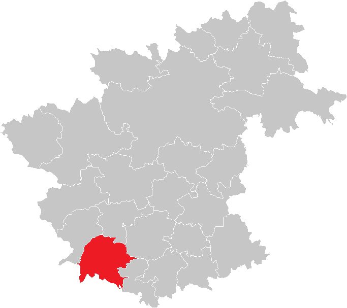 Bezirk Zwettl